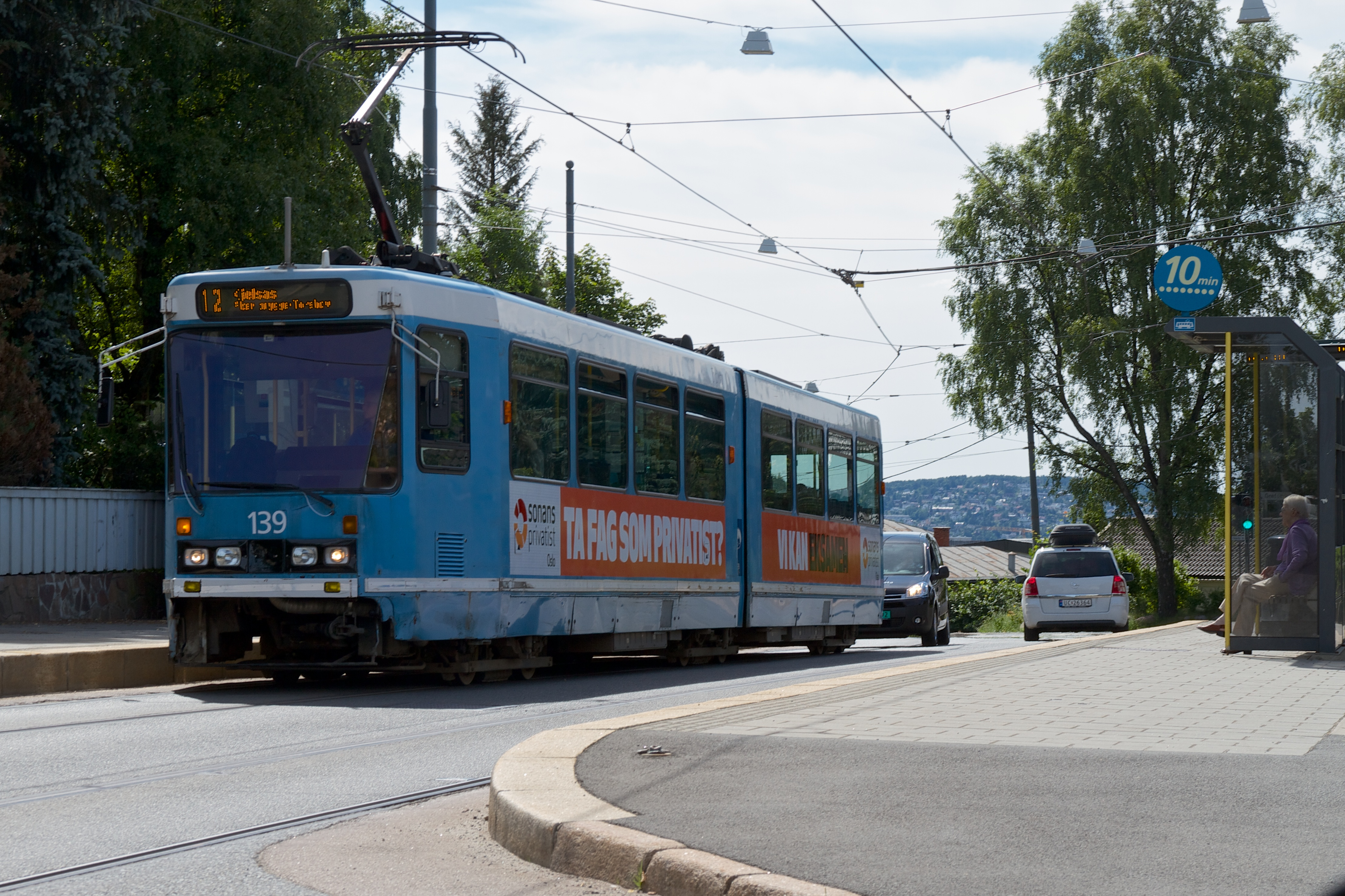 Glads vei holdeplass